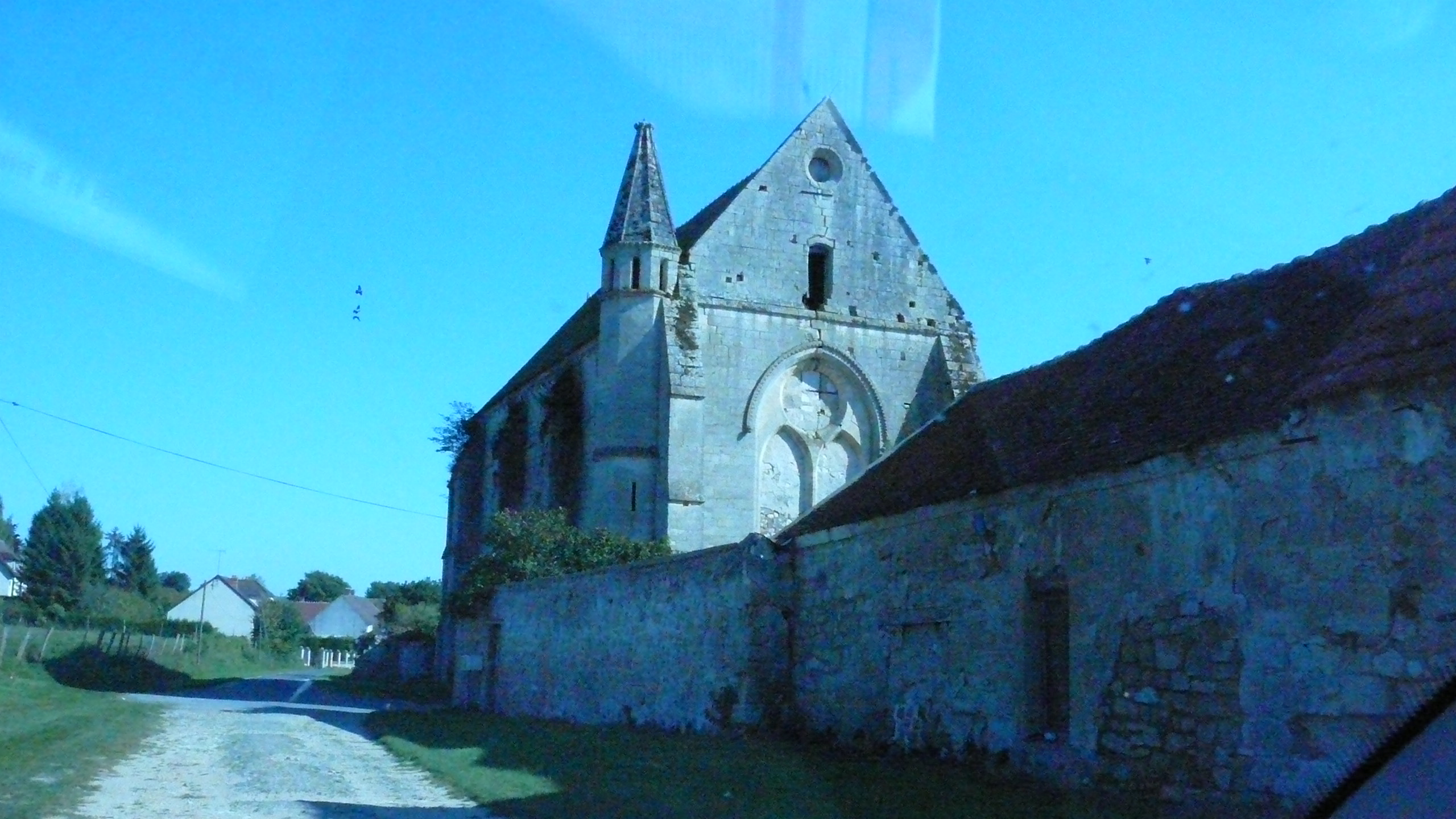 commanderie des Templiers de Montigny-l'Allier en Picardie, France